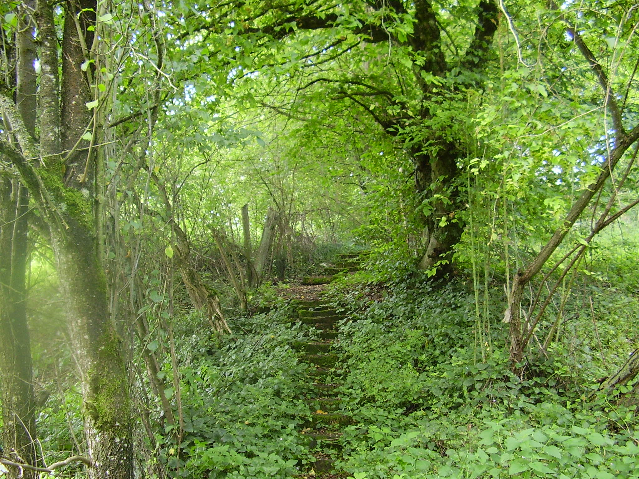 Korb (Möckmühl), Kerchstaffel. Alte Treppe zur Kirche, inzwischen modernisiert